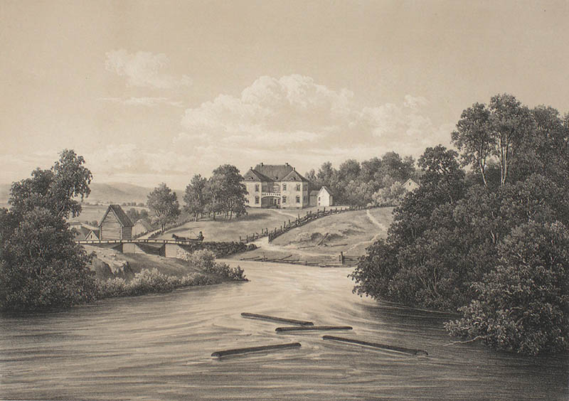 Illustrasjon hentet fra boken "Norge fremstillet i Tegninger" av Asbjørnsen, P.Chr. og utgitt av Chr. Tønsberg (no, 1848)